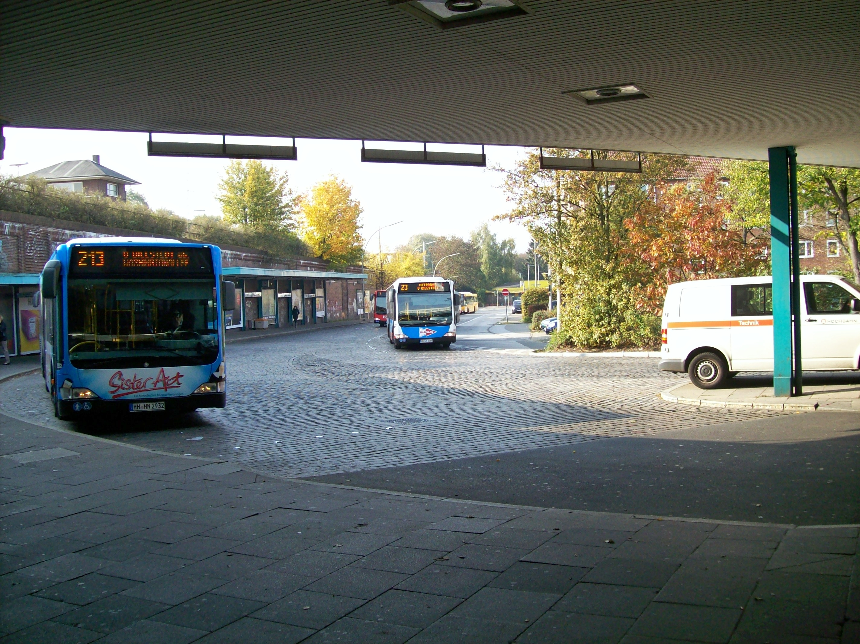 Barmbek ZOB